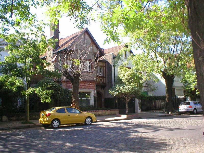 Casas en la zona de Belgrano R, Buenos Aires.